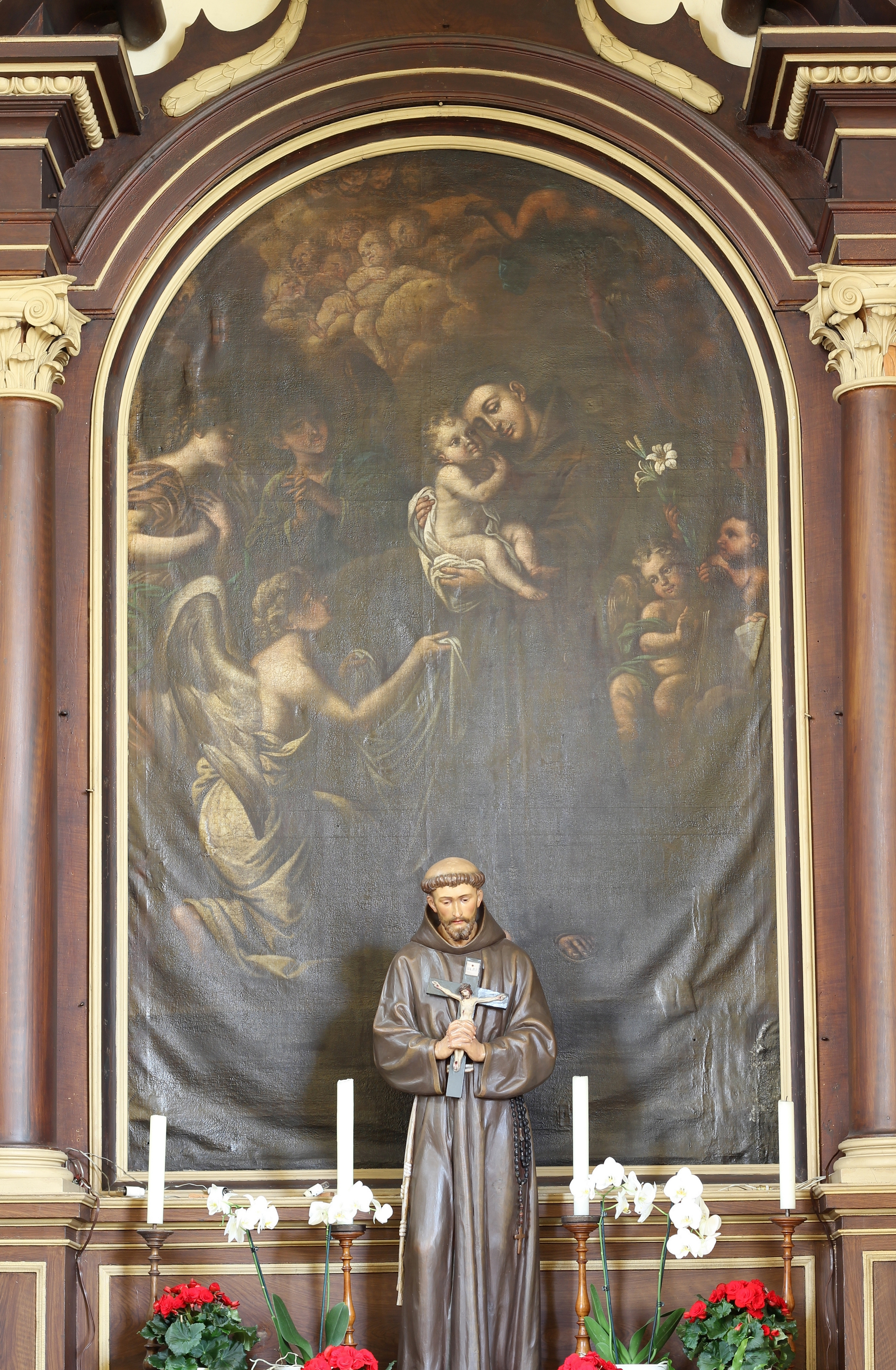 Altarblatt von Matthias Pußjäger in der Kapuzinerkirche St. Joachim und Anna in Lana